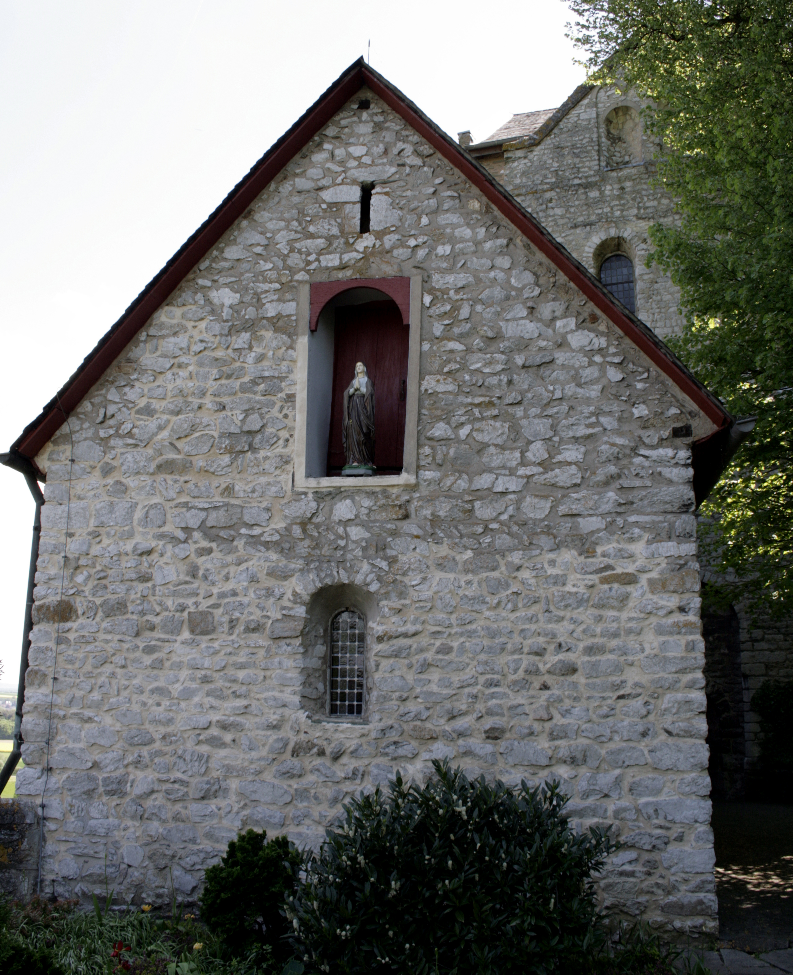 Michaelskapelle am Lubentiusstift Dietkirchen, Deutschland